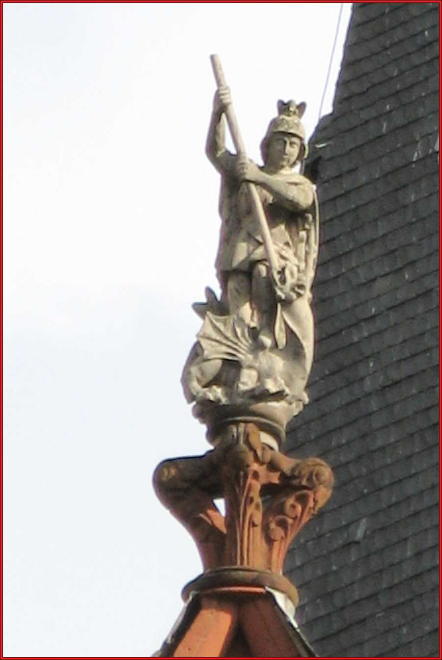 St. Georg hoch auf dem Limburger Dom